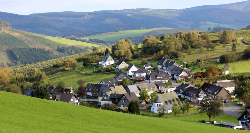 Heinrichsdorf (Olsberg)